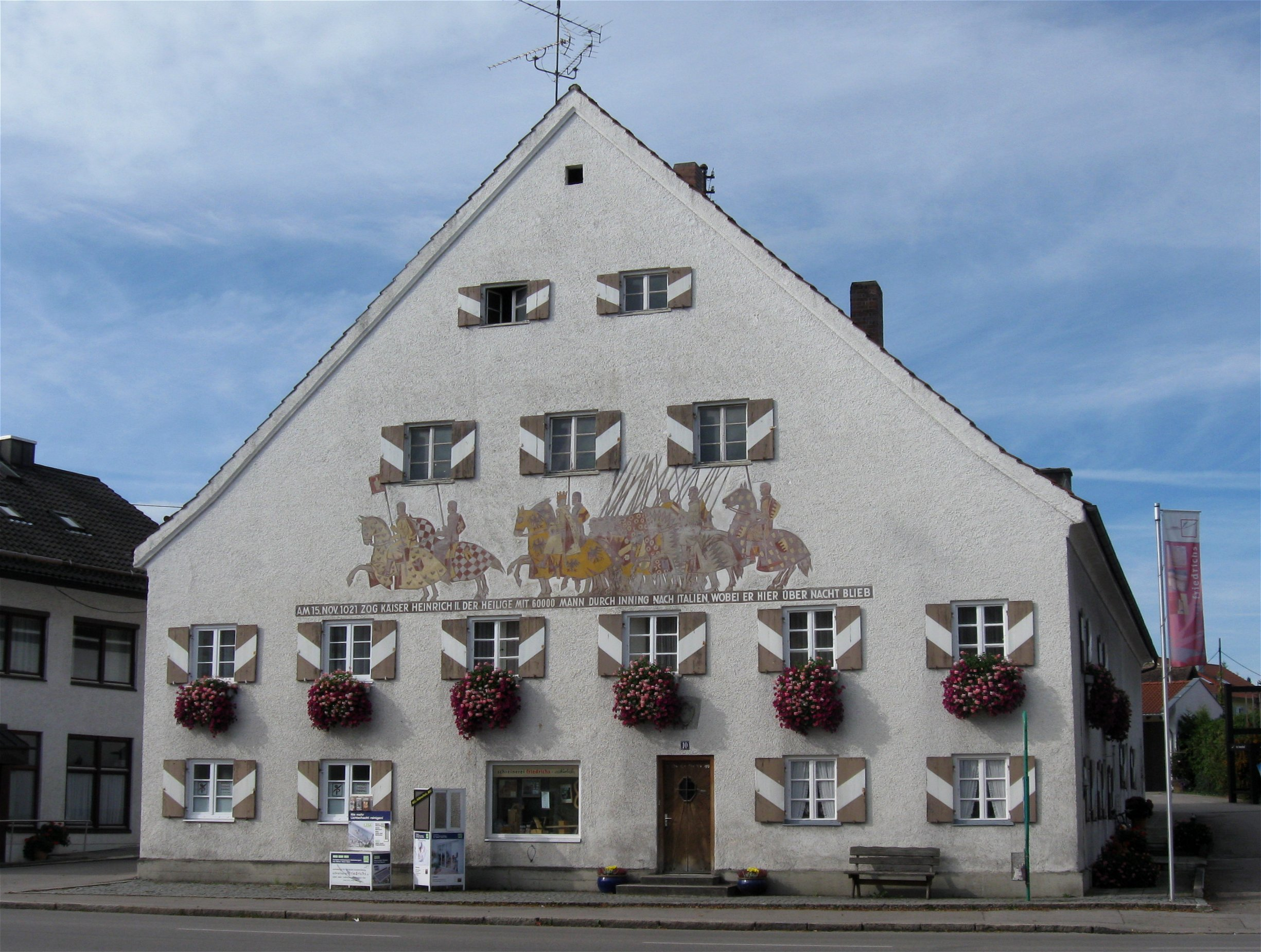 Marktplatz 10, Salzstadel, Inning am Ammersee